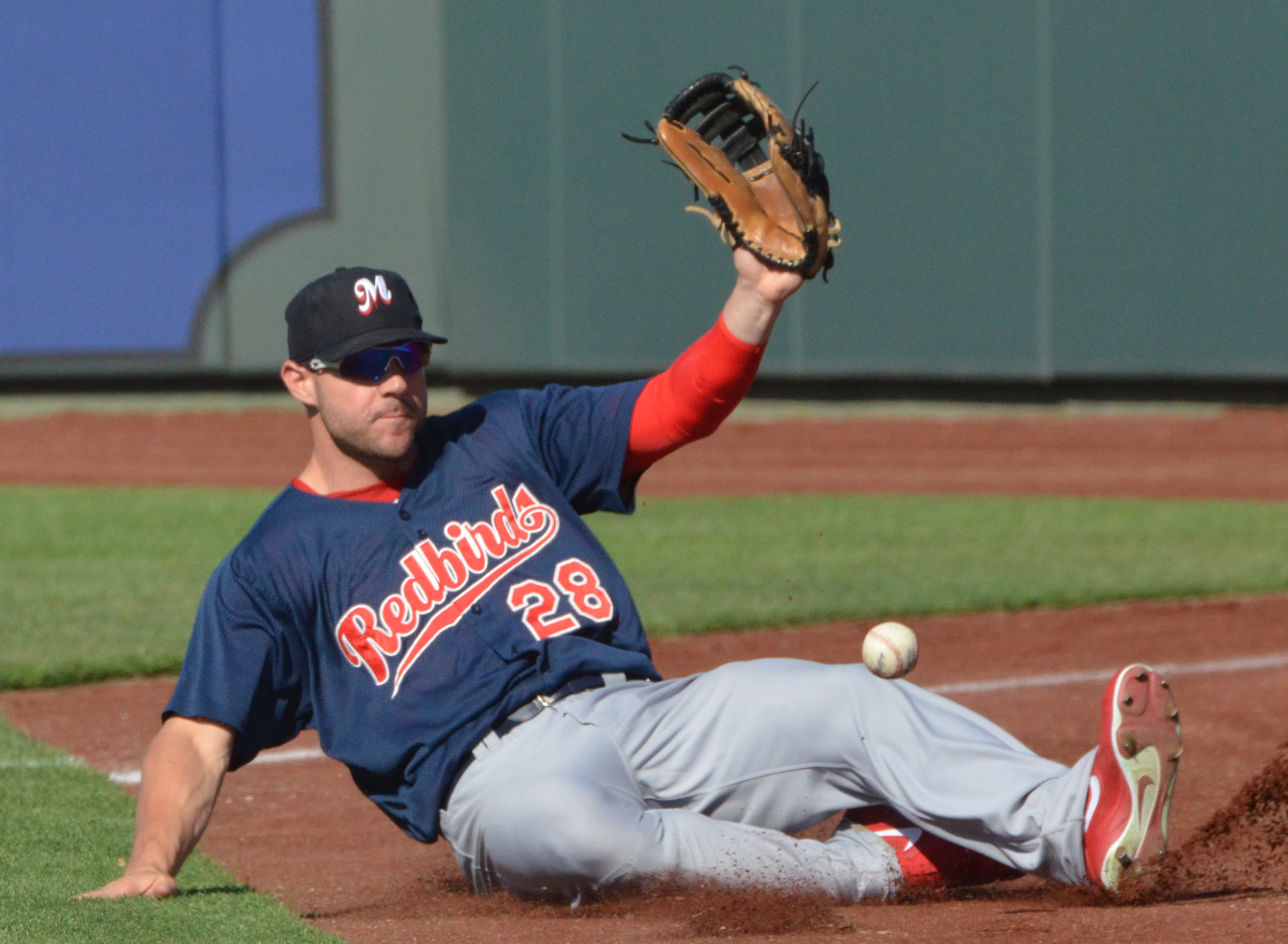 Jamie Romak